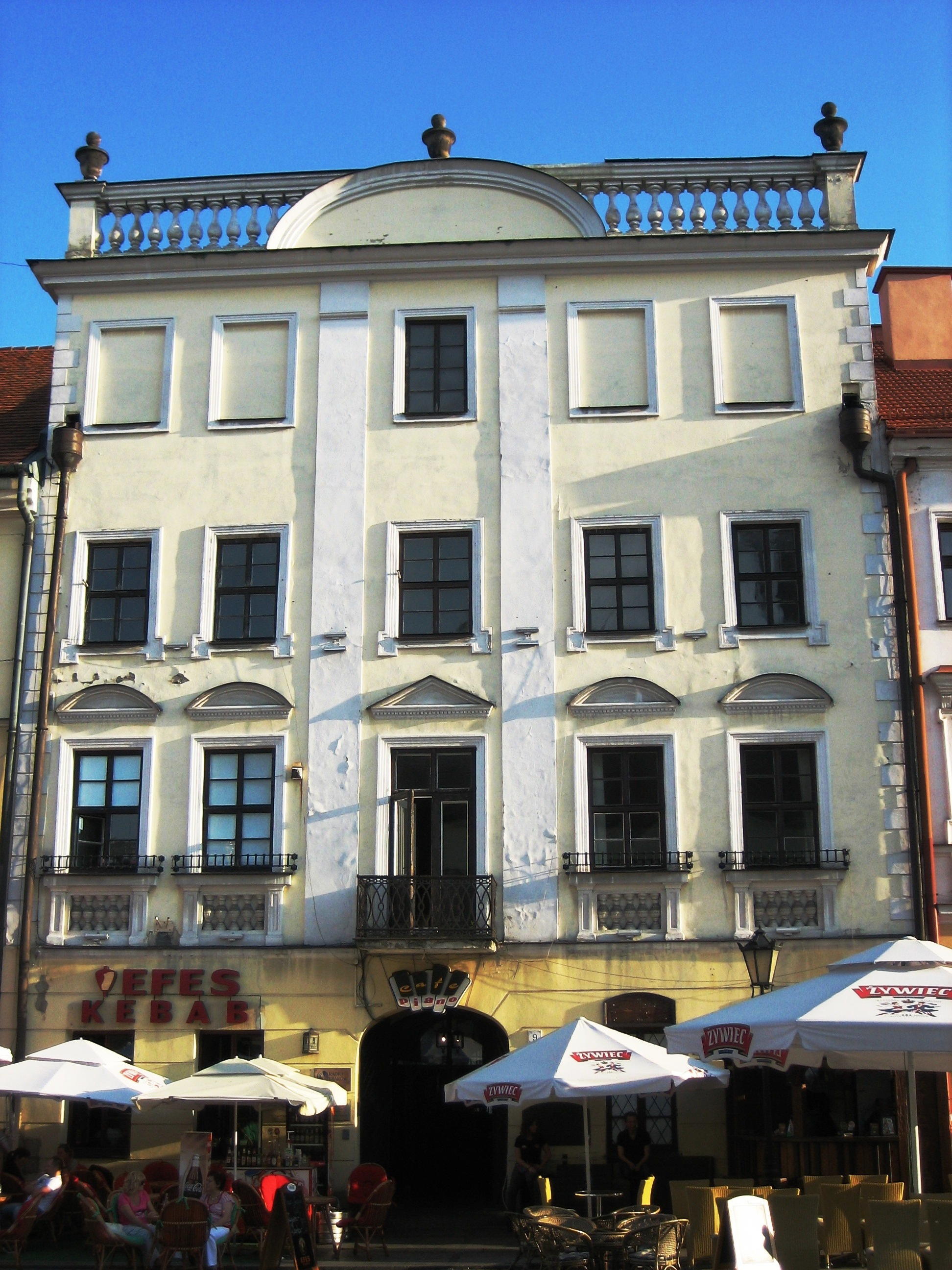 Zabytkowa kamienica w Tarnowie, Rynek 9